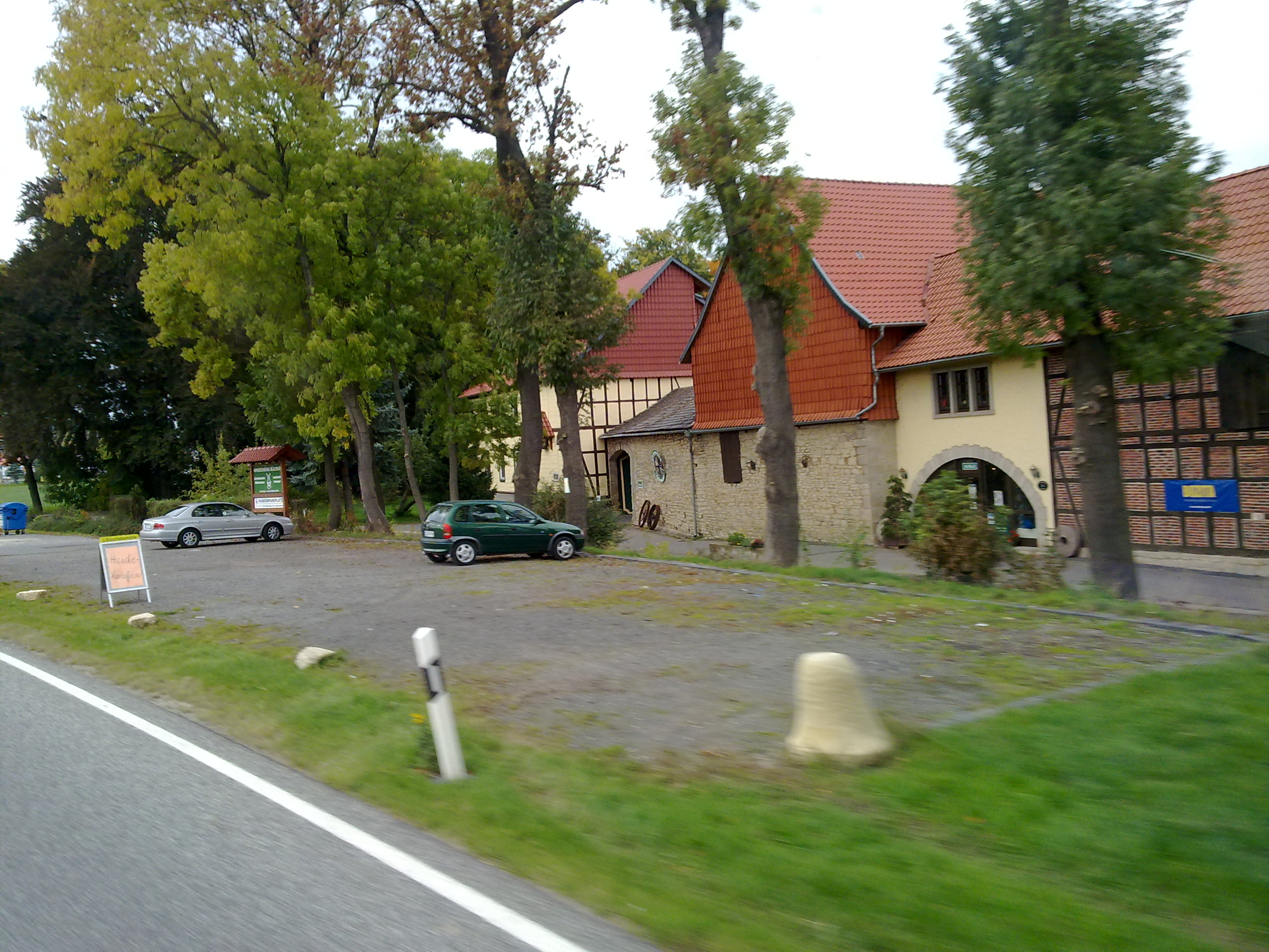 Worbis - Büschlebs Mühle